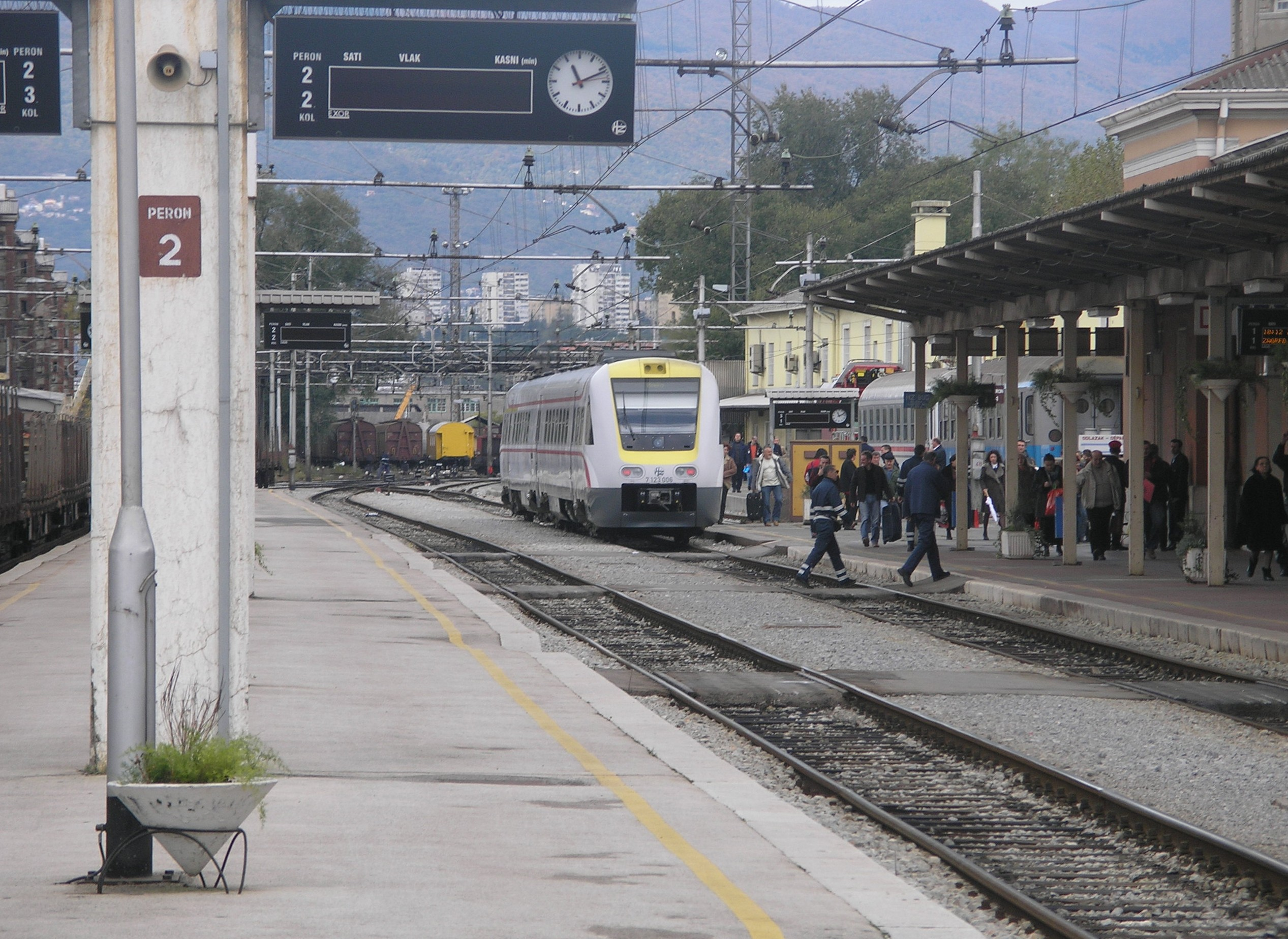 Rijeka railway station, Croatia